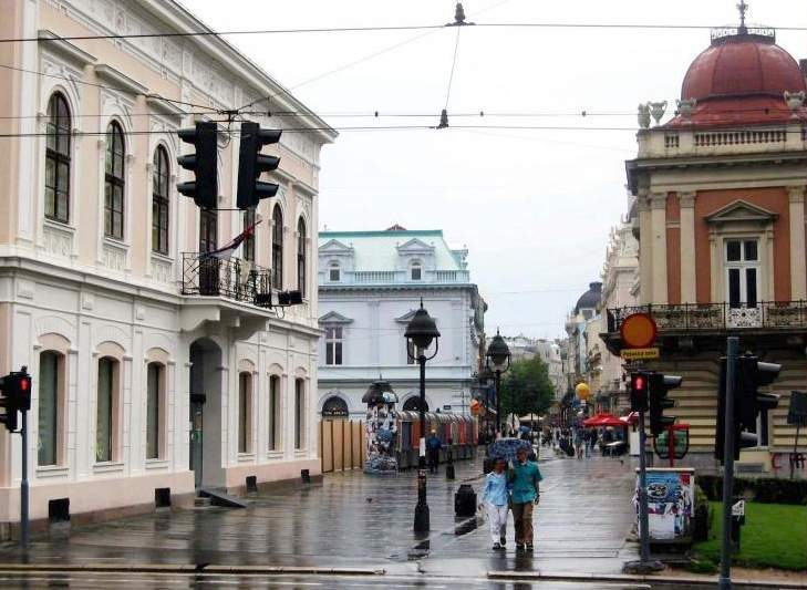 Belgrade,la rue Knez Mihajlova